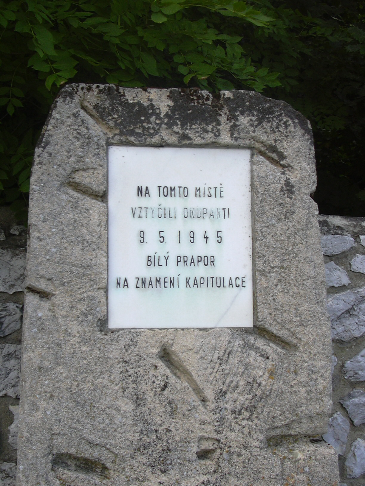 Ježkovice - detail pomníku (Vyškov- Czech republic)